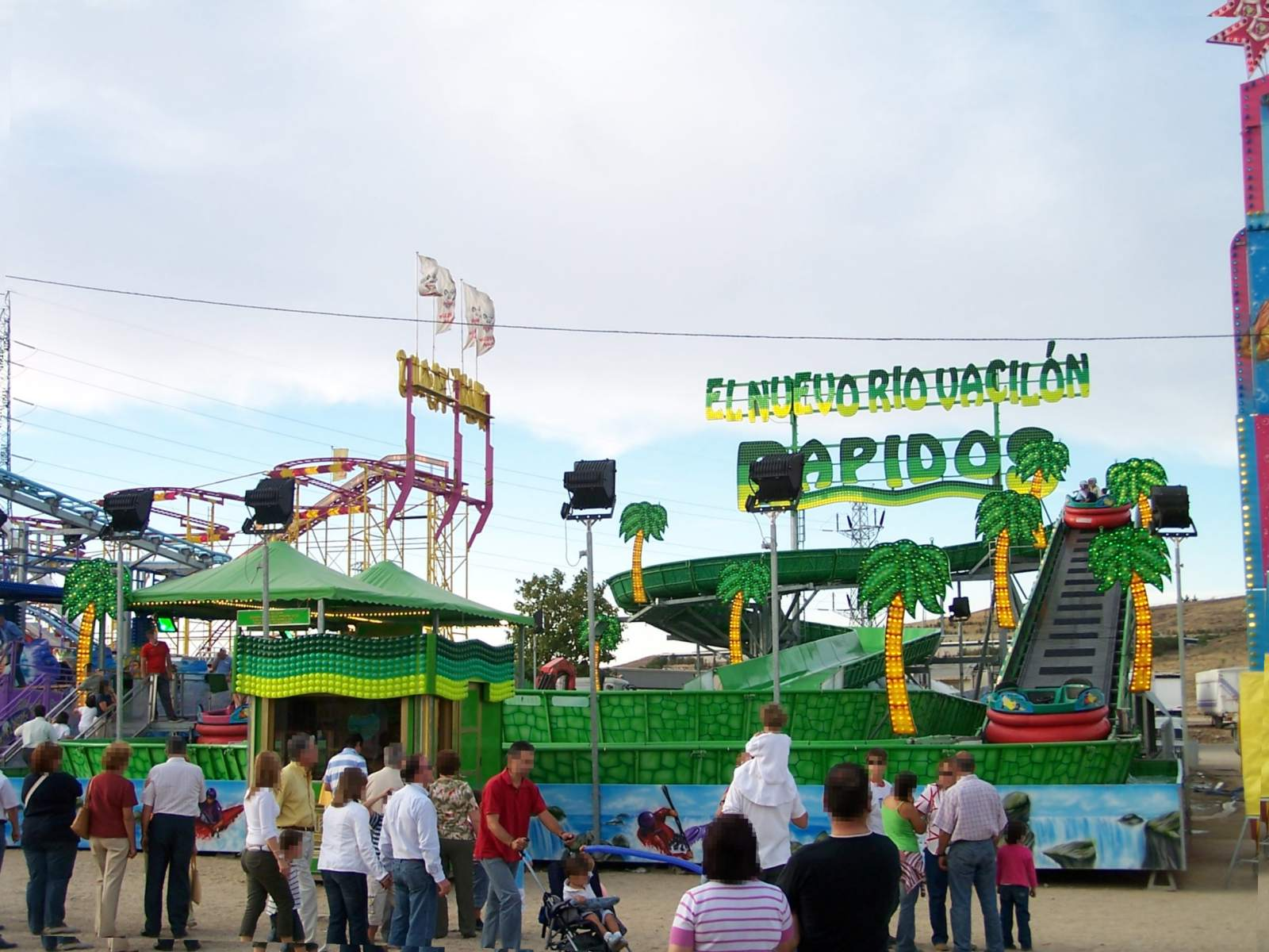 Es una foto hecha por mi mismo, de unos rápidos de la feria, que se pueden desmontar y transportar. La foto la hice yo mismo con mi cámara, el viernes de la feria (14-9-2005), que había más gente.